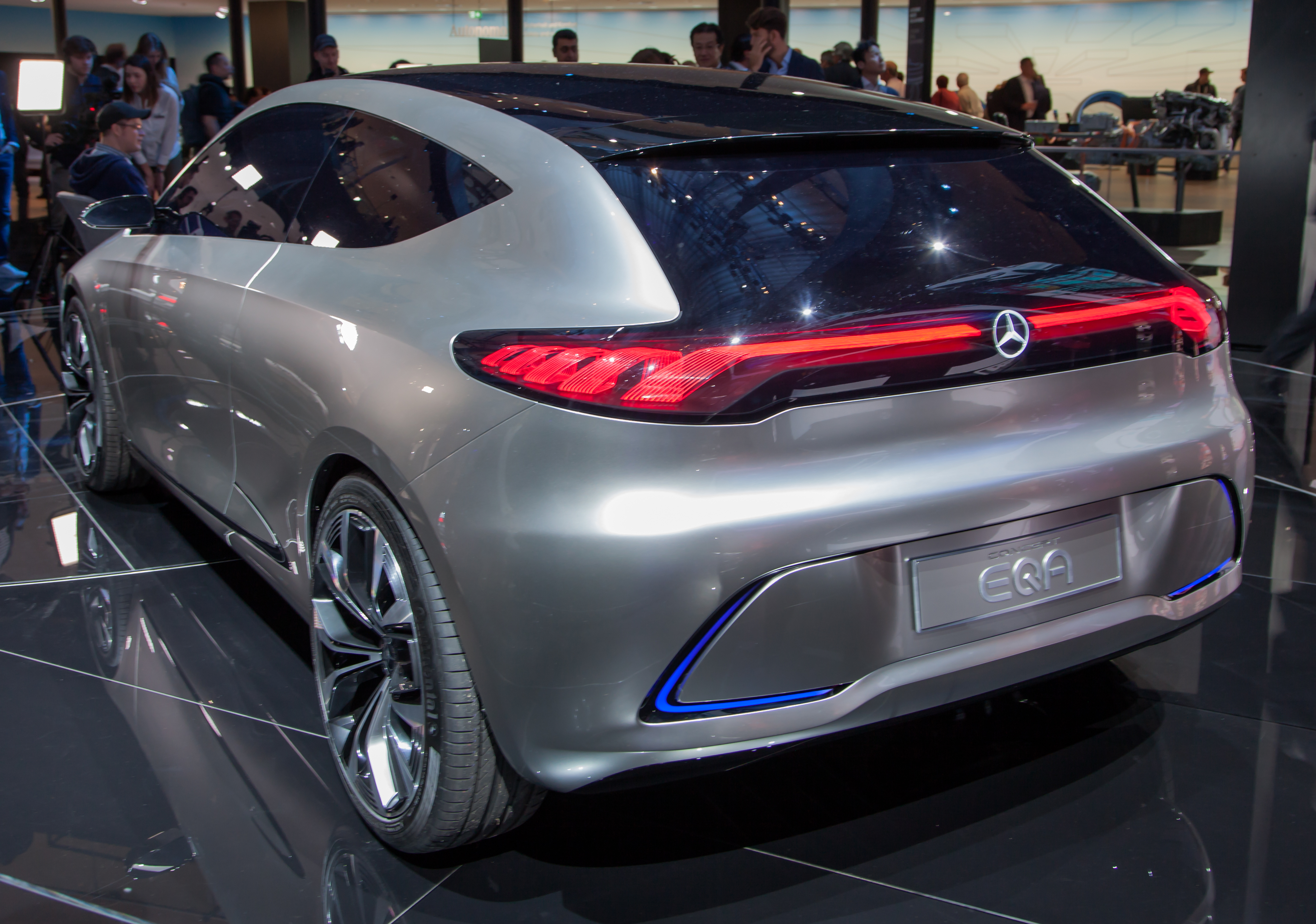 Mercedes-Benz EQA auf der IAA 2017